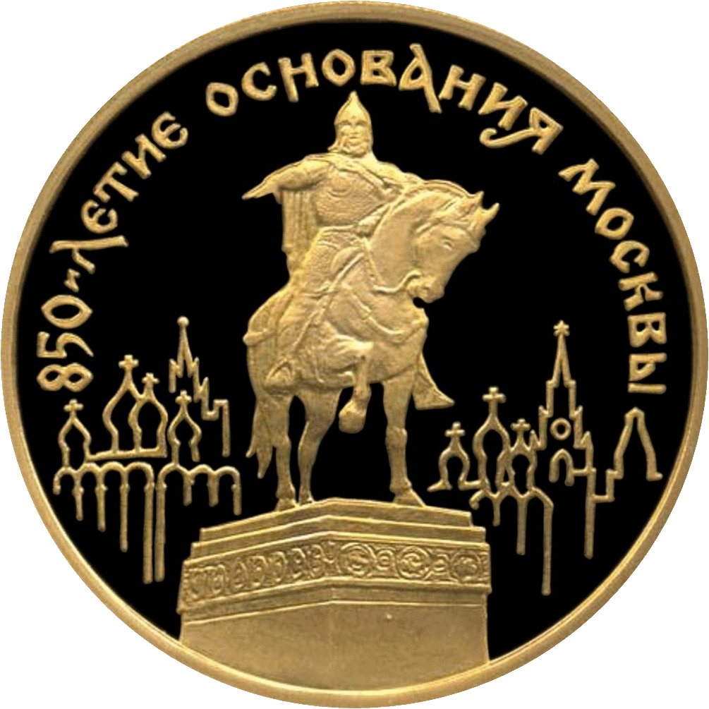 Монета Банка России — «Историческая серия», 850-летие основания Москвы, Памятник Юрию Долгорукому, 100 рублей, реверс